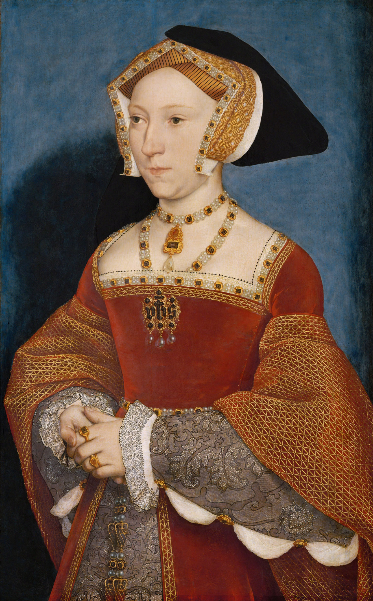 "Jane Seymour" (1536-1537); Kunsthistorisches Museum, Vienna